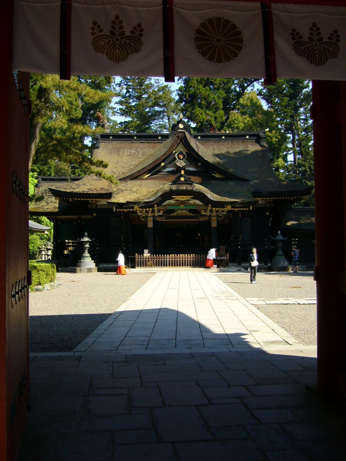 katori-jinguu-shrine-haiden2,katori-city,japan